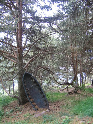 Maubert, arboretum de Roure